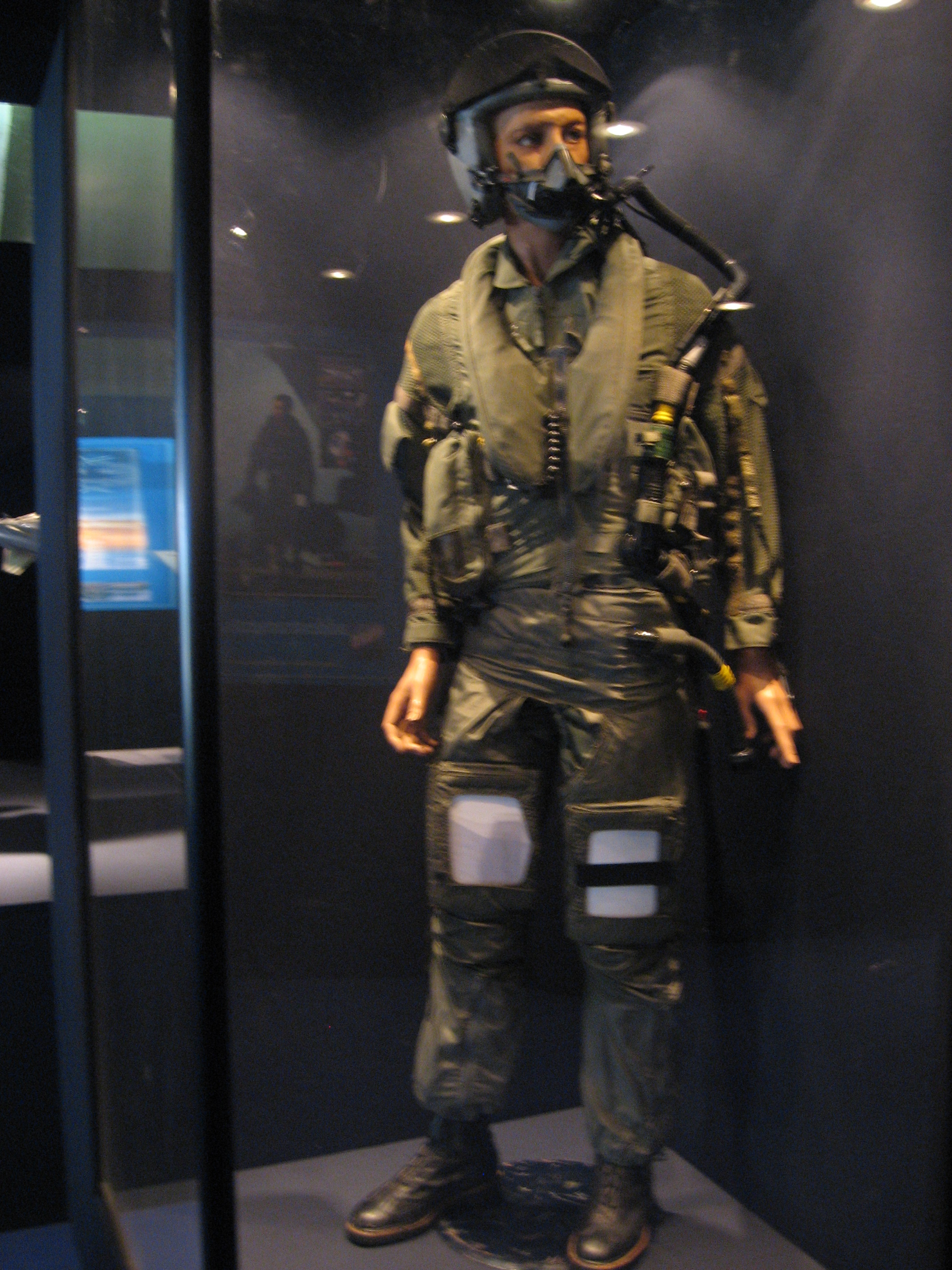 Tenuta di volo da pilota di Eurofighter Typhoon dell'Aeronautica Militare Italiana.